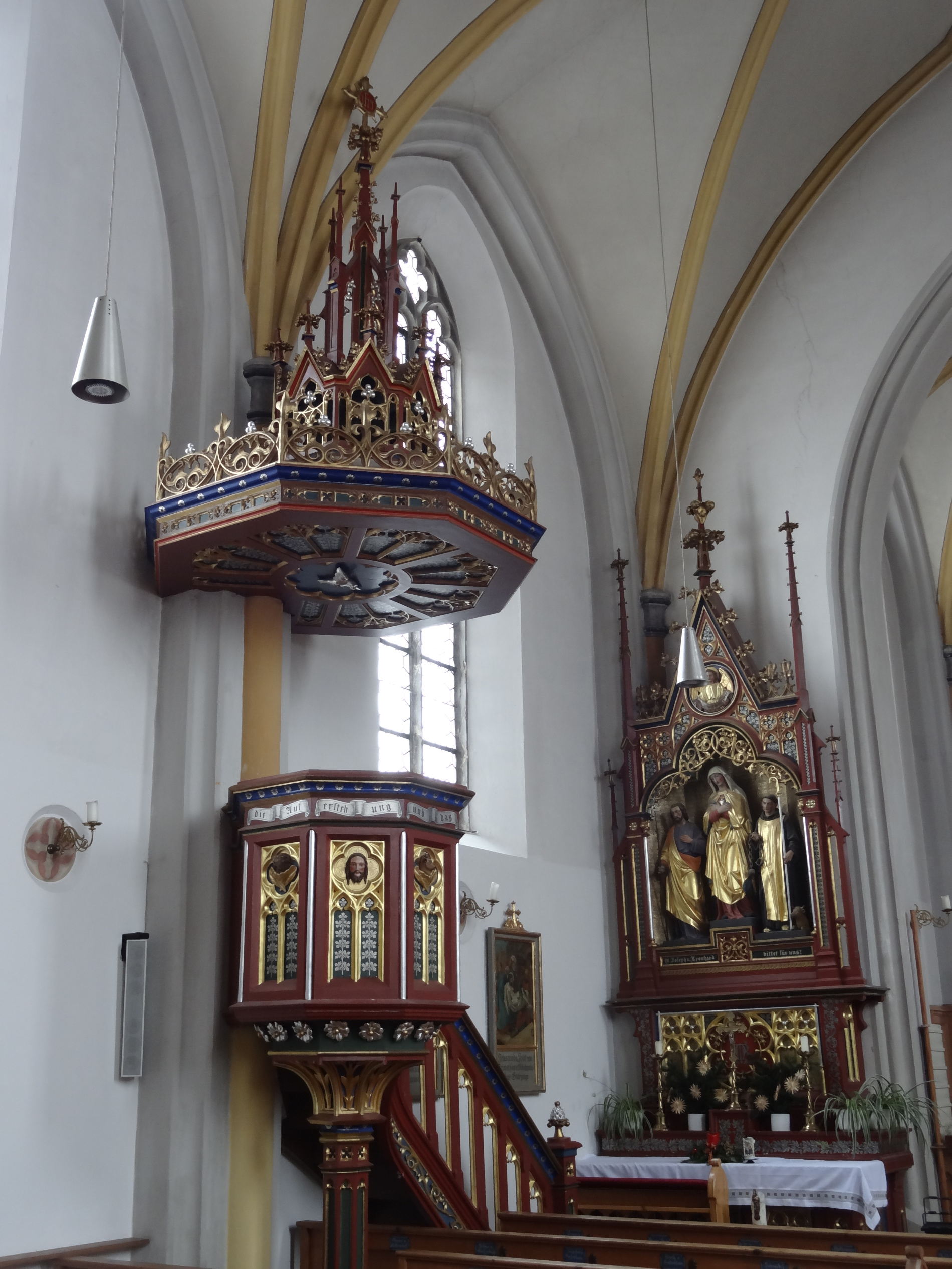 Neugotische Kanzel der Pfarrkirche St. Georg in Ast (Gde. Tiefenbach, Lkr. Landshut, Bayern)